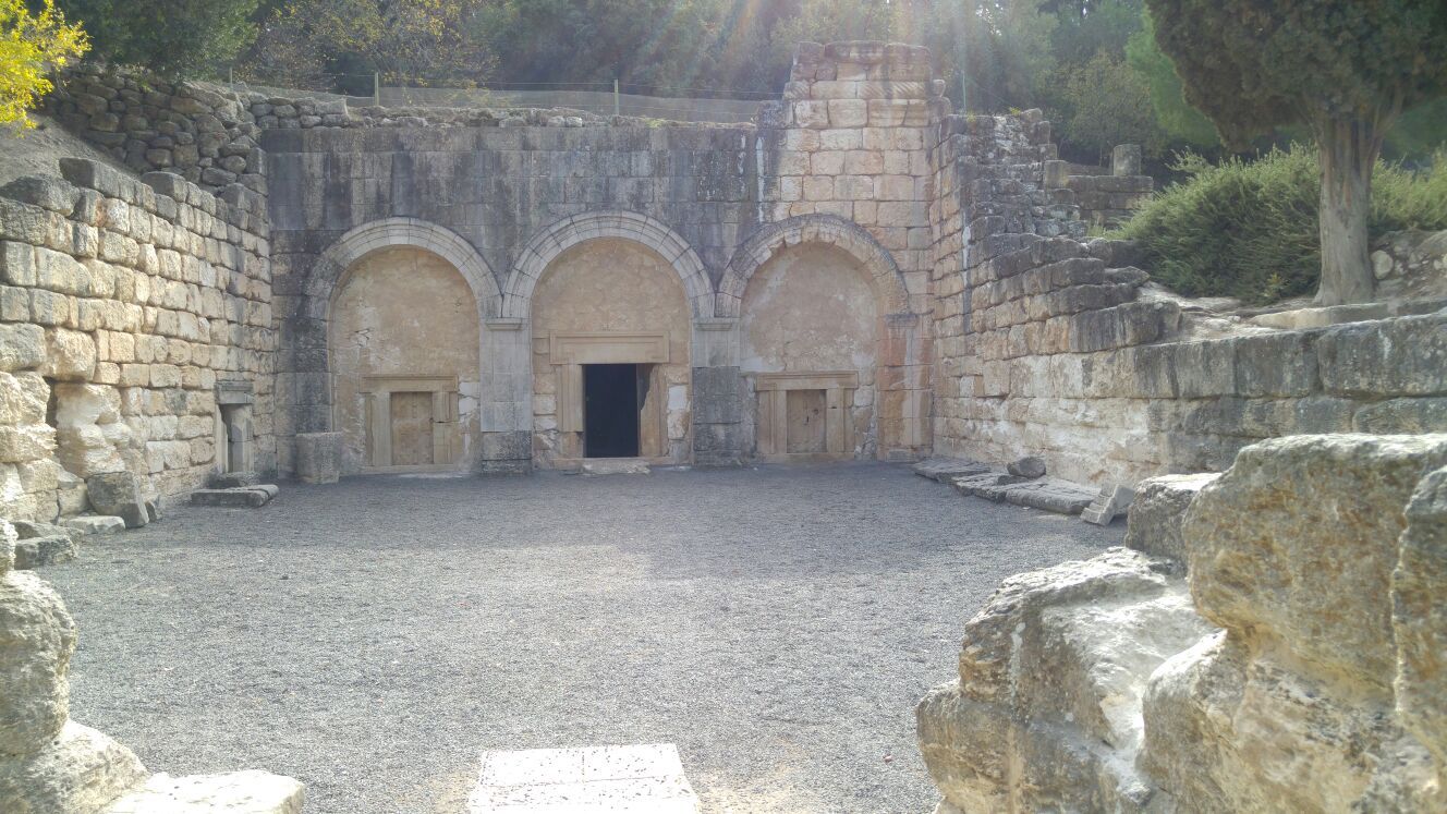 ورودی اصلی گوردخمه ها در بیت شعریم